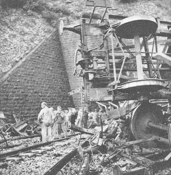 Blick gegen Tunnelportal Piano Tondo. Zu erkennen ist ein Radsatz mit festanliegenden Bremsklötzen.